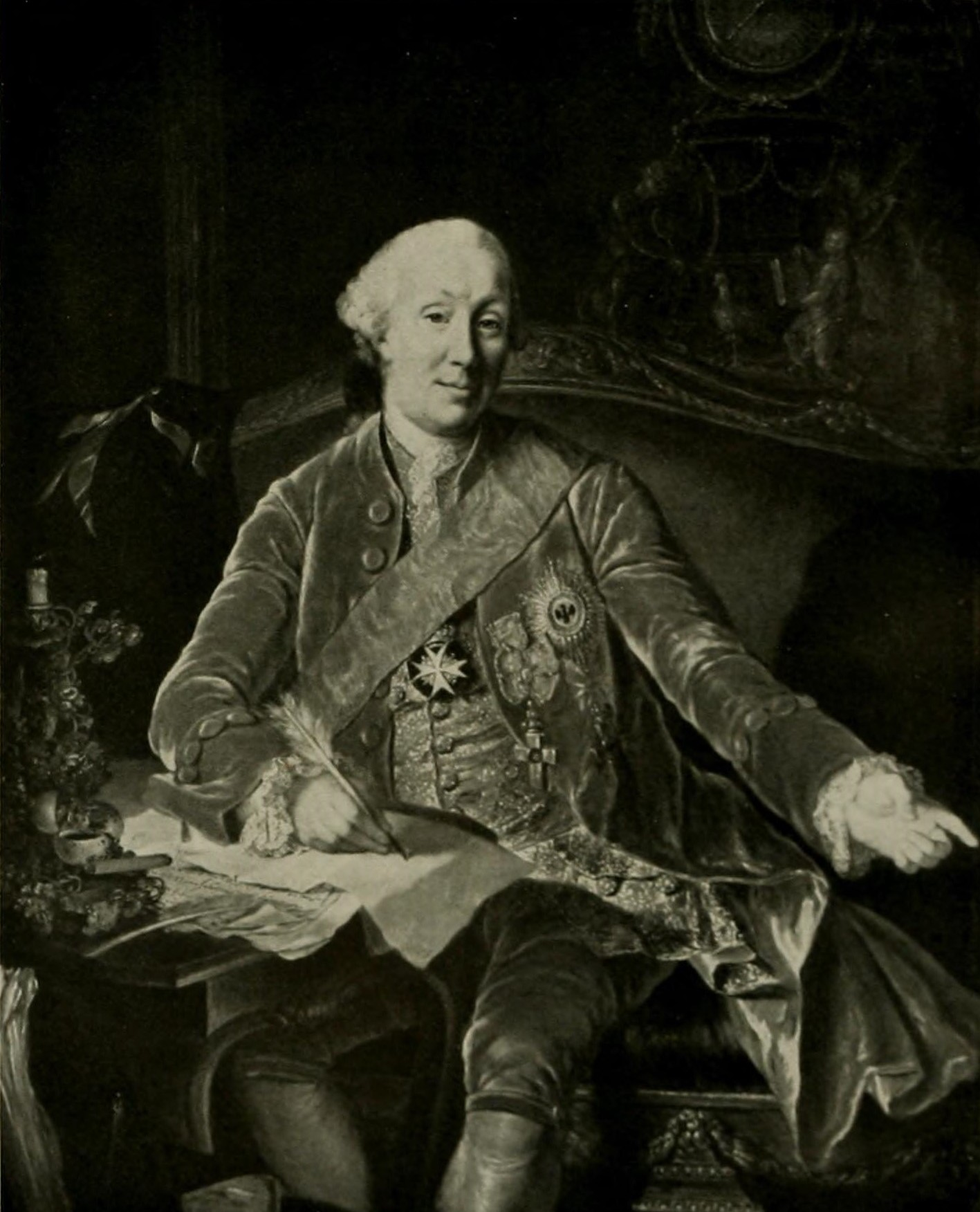 Anna Dorothea Therbusch: Portrait des Ministers Ludwig Philipp vom Hagen, 1771